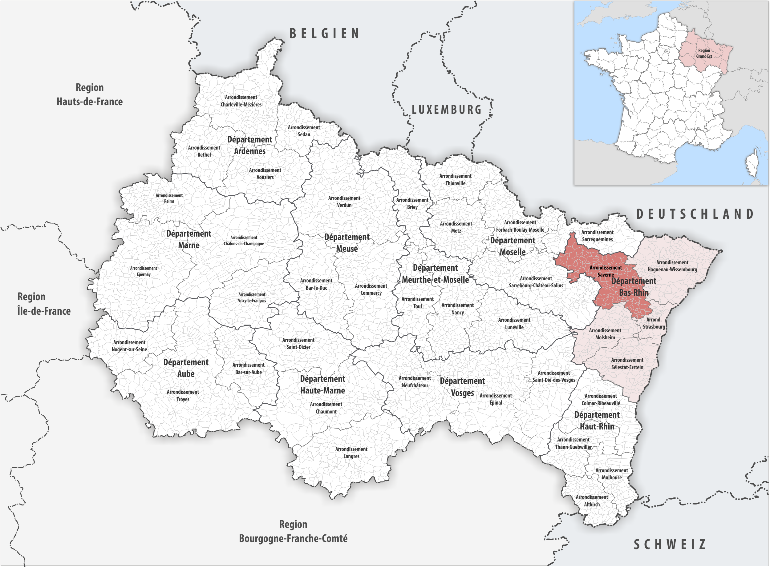 Lage des Arrondissements Saverne